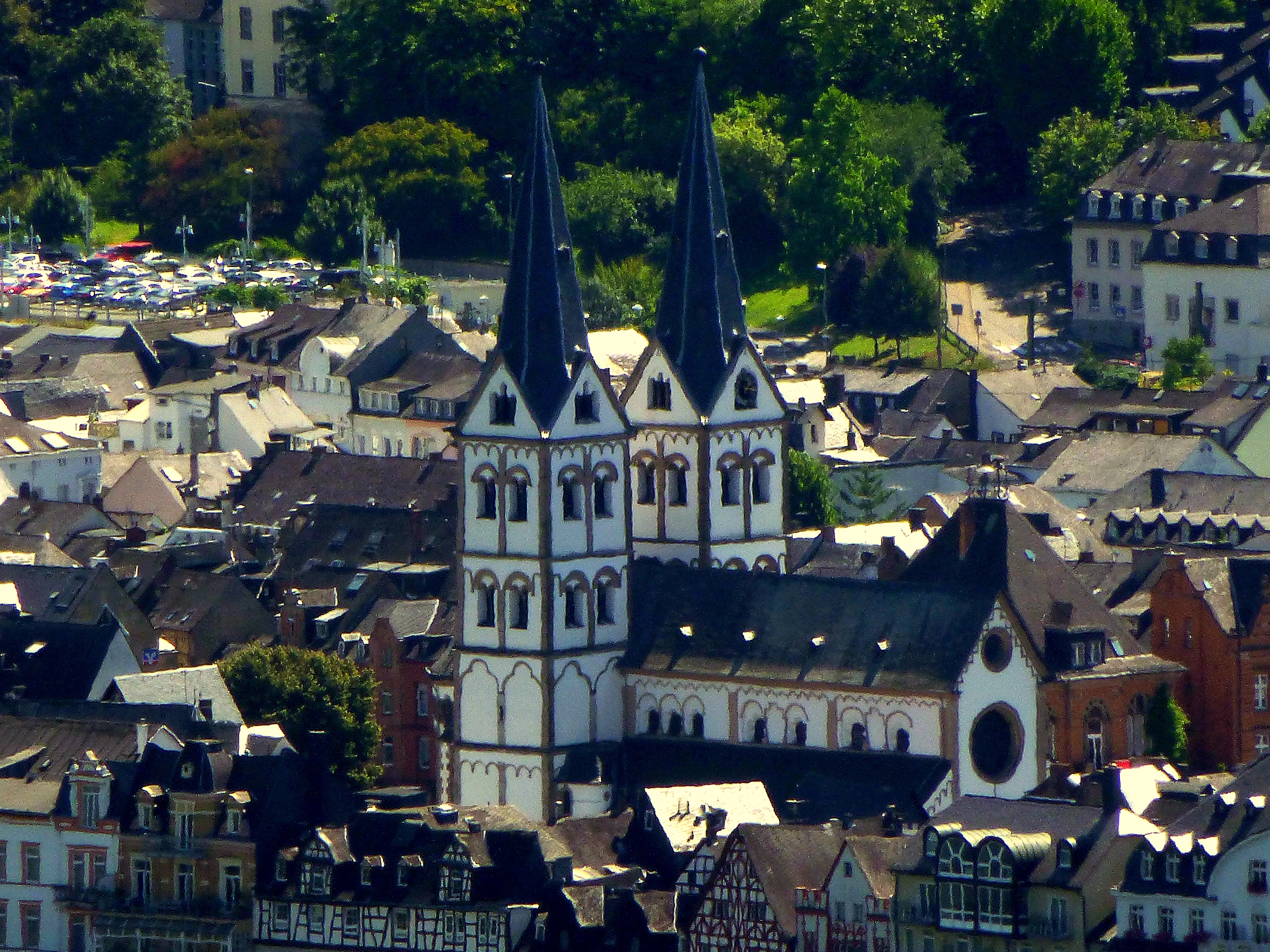 Kathol. Kirche St. Severus vom Café-Restaurant Vierseenblick aus gesehen